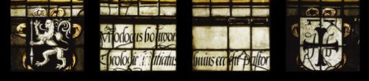 Sint Janskerk: Interieur, gebrandschilderde glazen : De Apostelglazen, detail middendeel van glas nr. 47, Thomas, eigenlijk Philippus (opmerking: Gefotografeerd voor: De 72 glazen van de Sint Janskerk in Gouda, 2008)